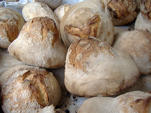 Civraxiu Pane Giornaliero Pane di semola dalla tipica forma conica Giba, Sardegna